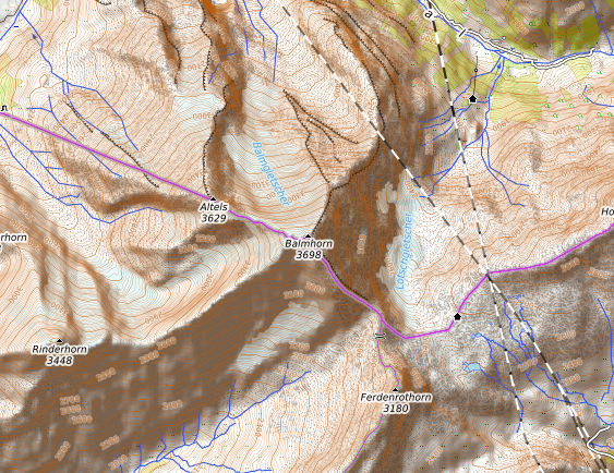 carte réalisée sur umap This map may be incomplete, and may contain errors. Don't rely solely on it for navigation.